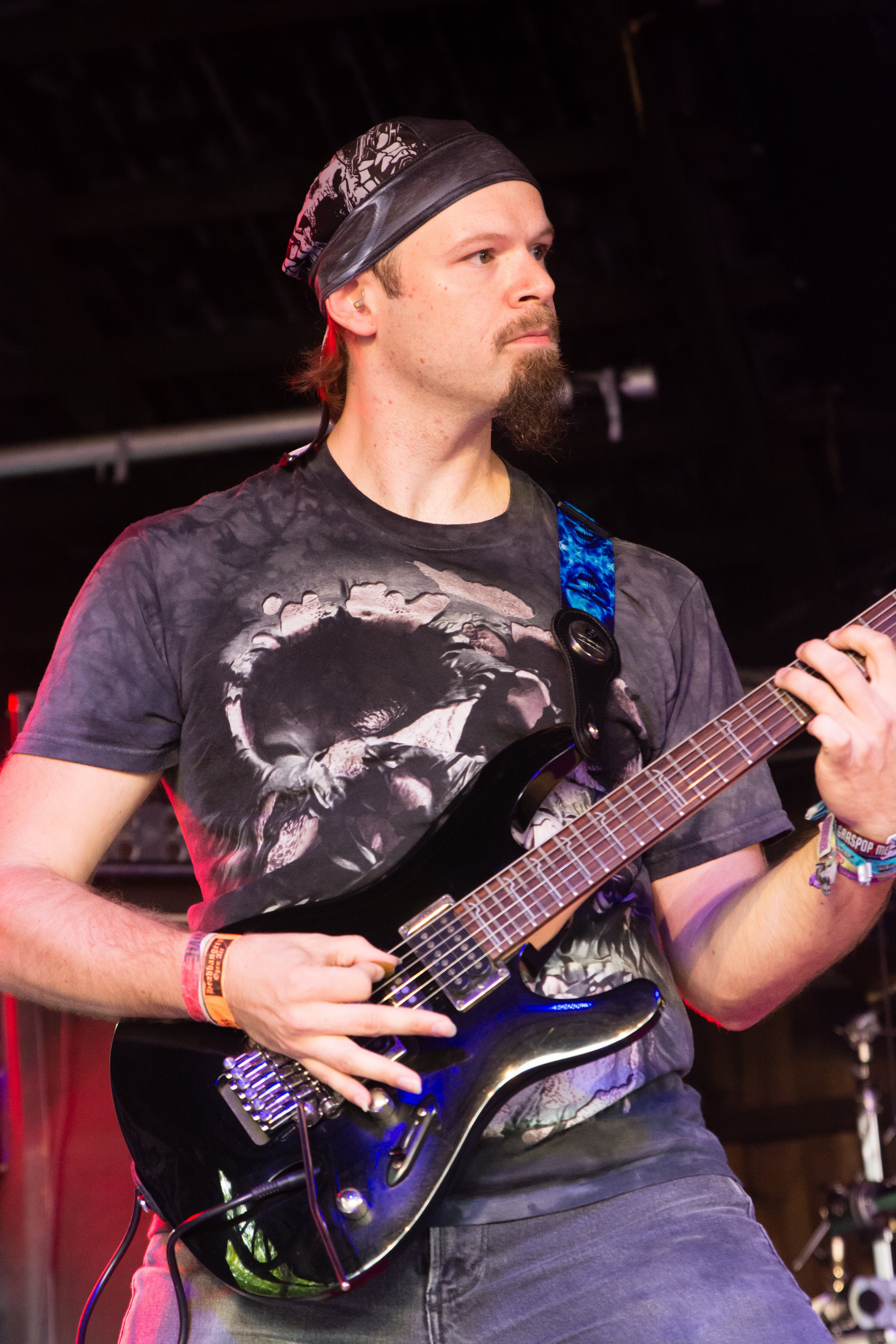 Ostrogoth beim Headbangers Open Air 2016